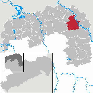 Torgau in Saxony - Landkreis Nordsachsen